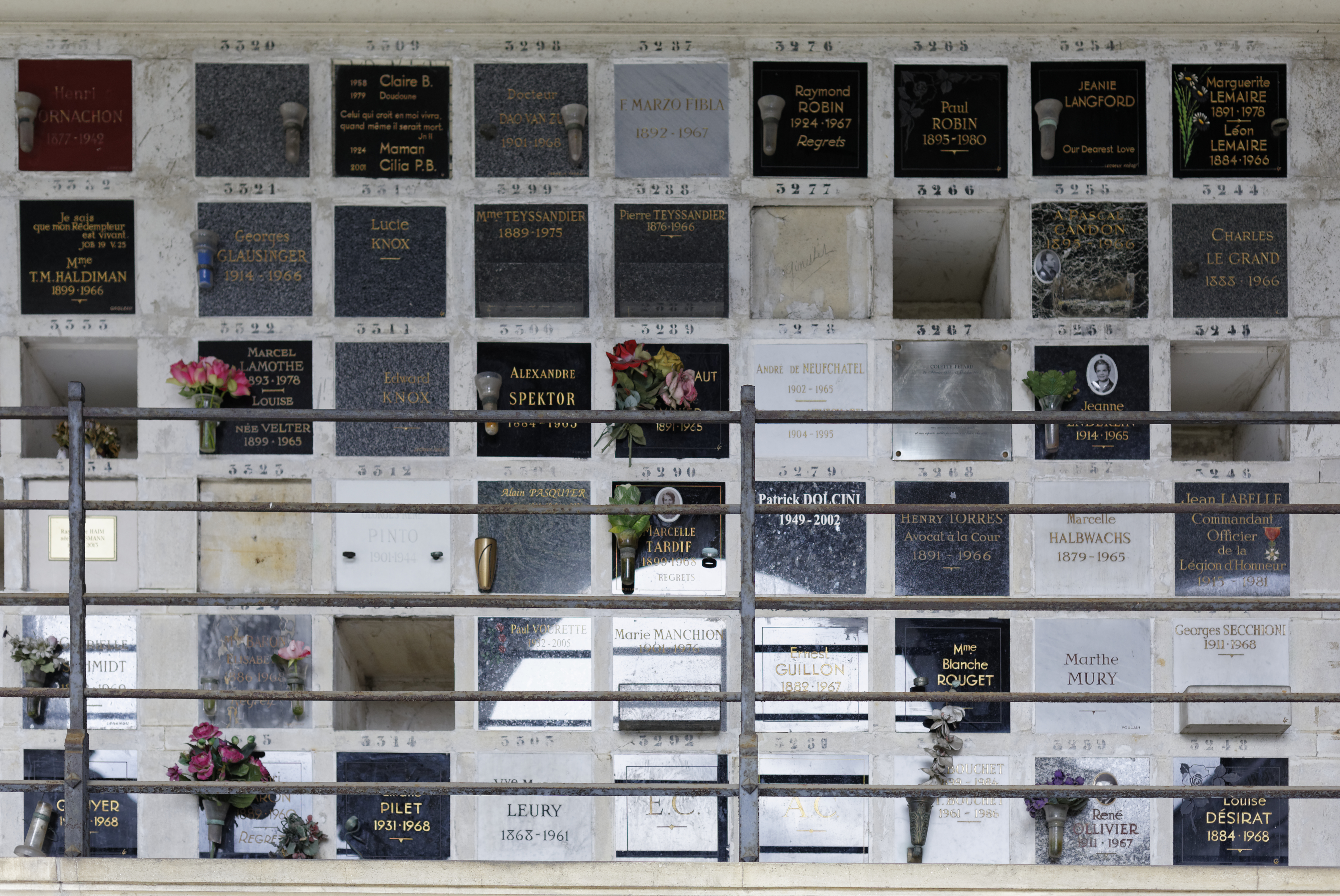 Cases du columbarium du cimetière du Père-Lachaise.